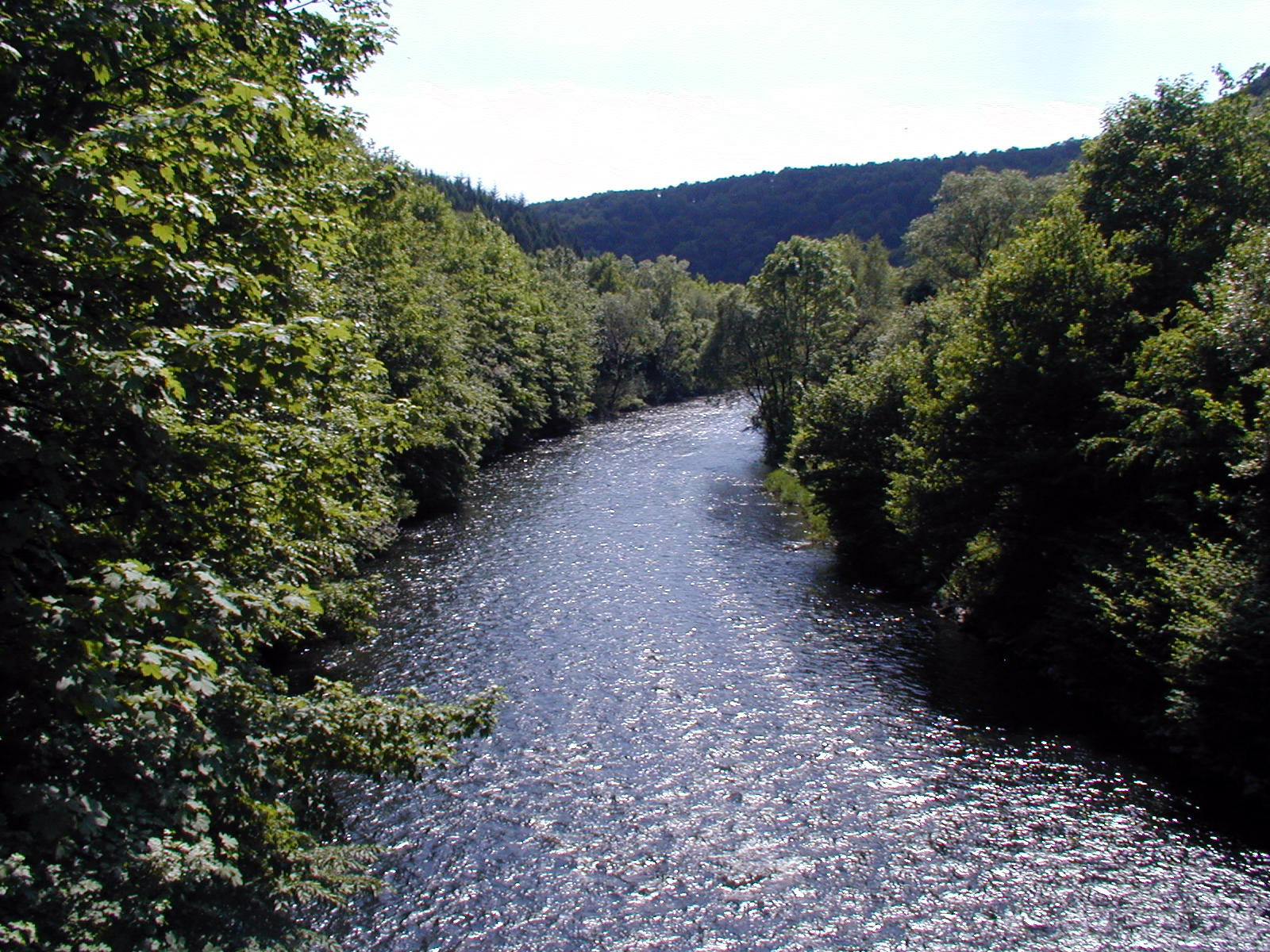 Die Wupper bei Friedenstal im Staatsforst Burgholz (Wuppertal) 2001 selbst fotografiert von Benutzer:Morty 21:04, 23. Dez 2005 . . Morty . . 1600 x 1200 (467761 Byte)